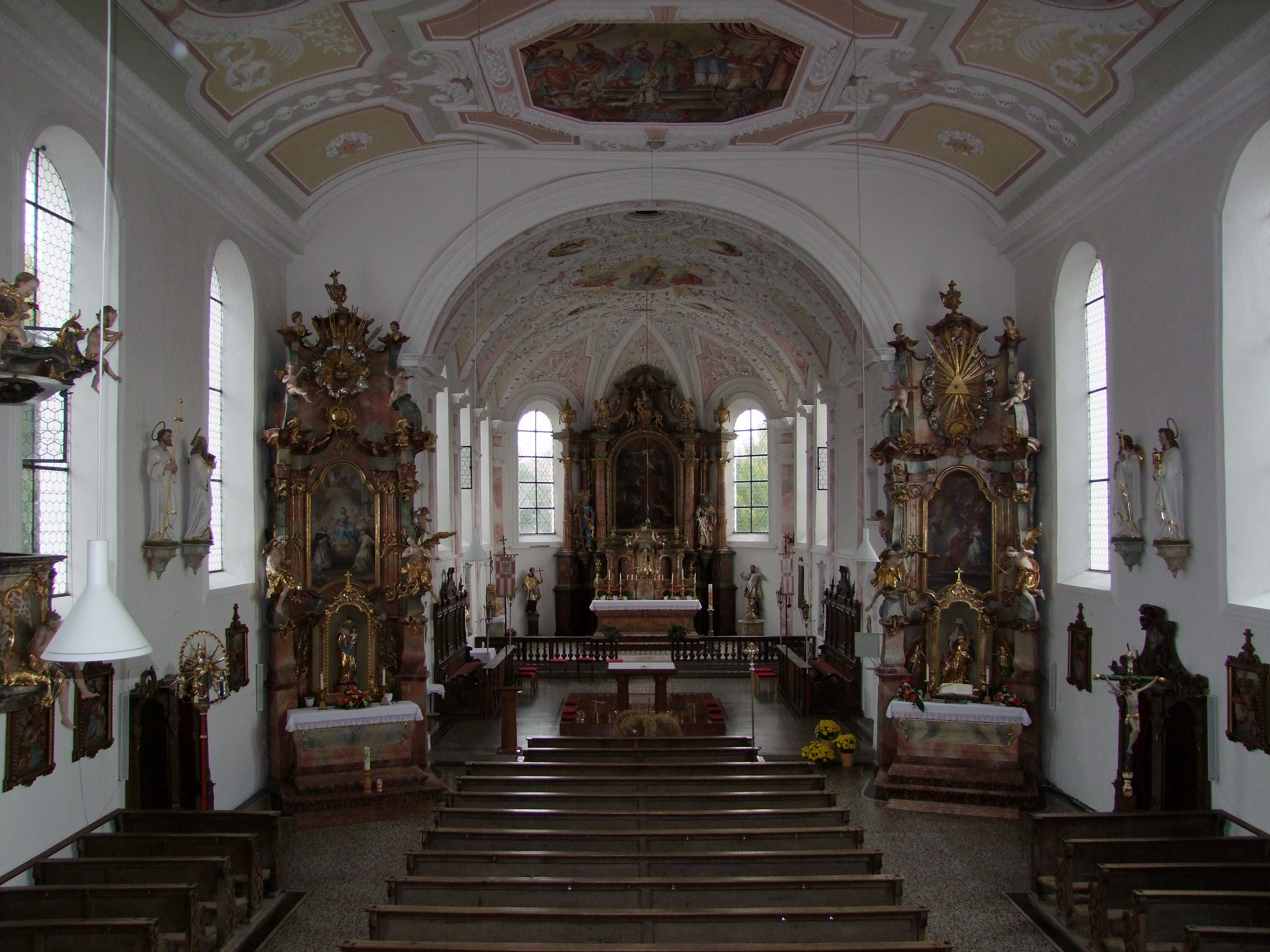 St. Martin im oberschwäbischen Tussenhausen in Bayern/Schwaben